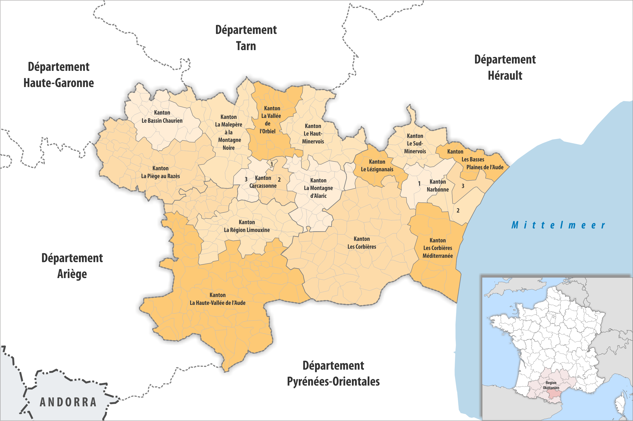 Gemeinden und Kantone im Departement Aude